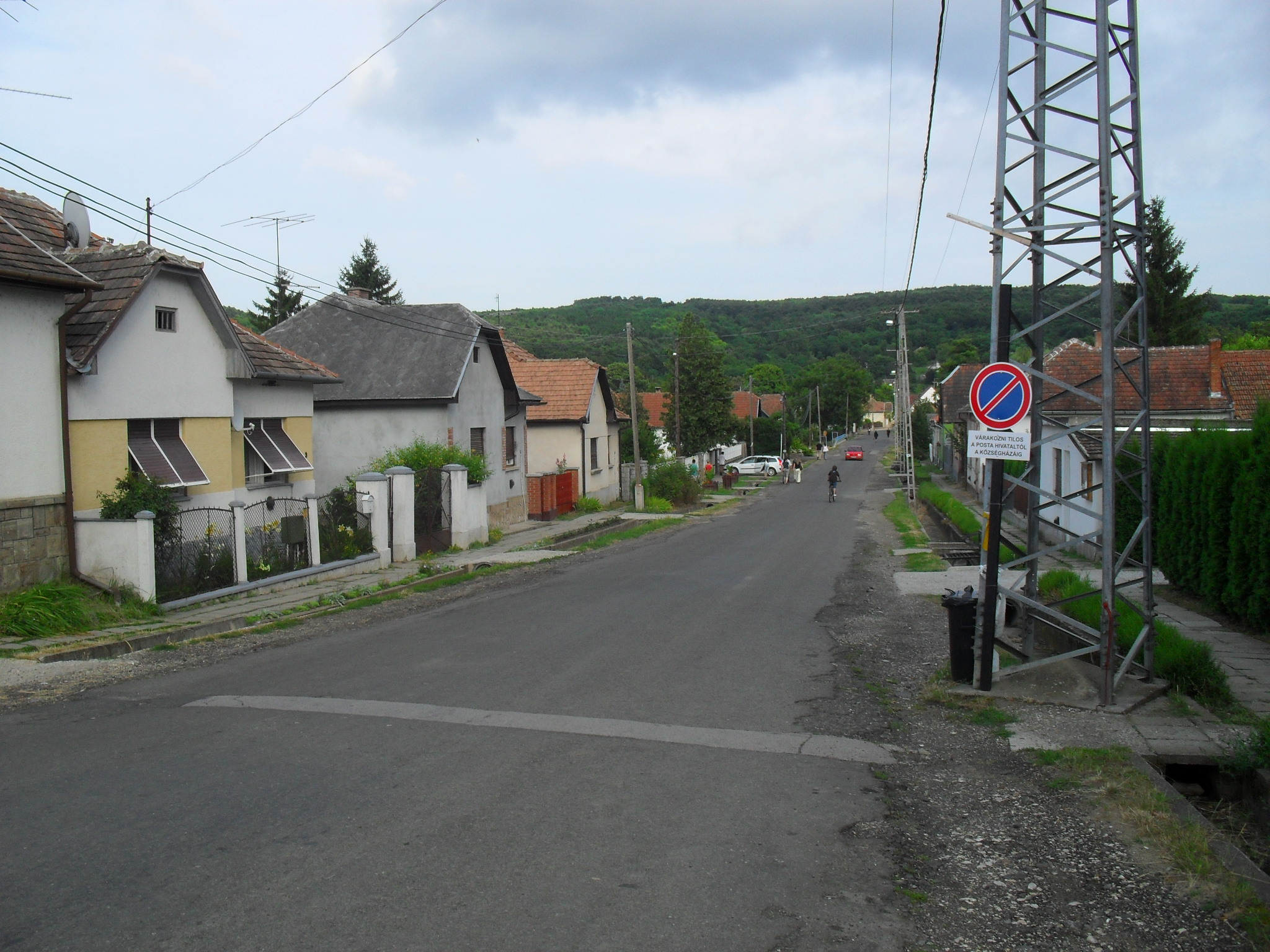 Bernecebaráti - Széchenyi utca